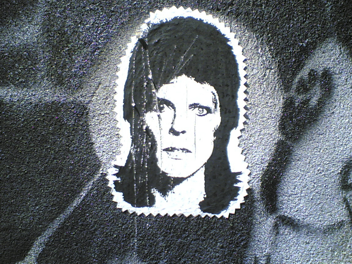 Londrina, PR